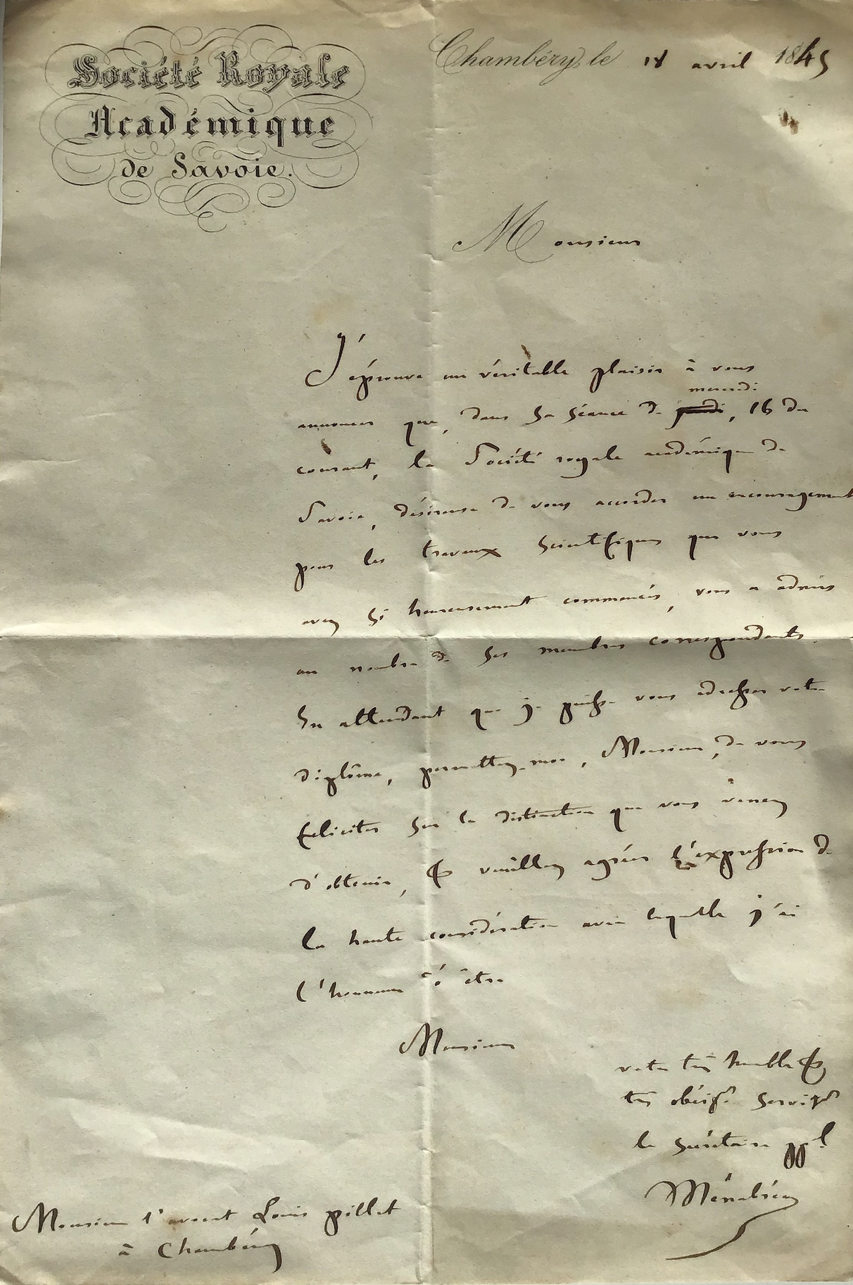 Document de nomination de Louis Pillet comme membre correspondant de la Société Royale Académique de Savoie, future Académie de Savoie, signé de Léon Menabréa.